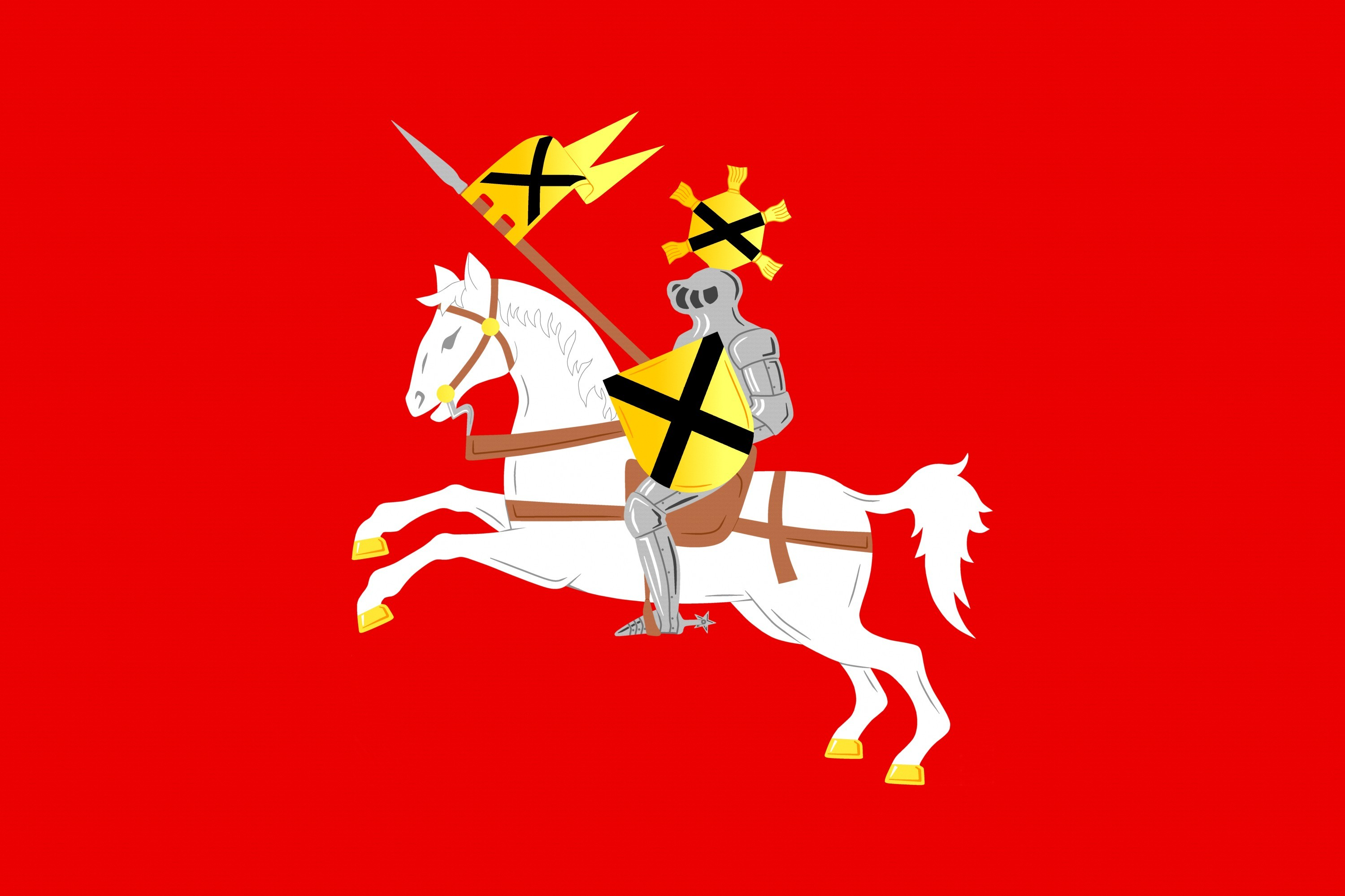 Česky: Vlajka města Krásné Údolí.